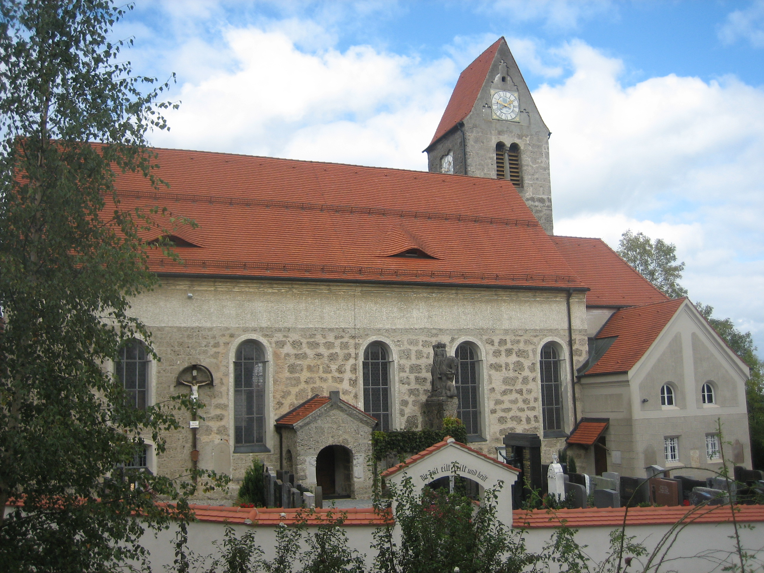 St. Georg, Gemeinde Böhen, Landkreis Unterallgäu, Bayern